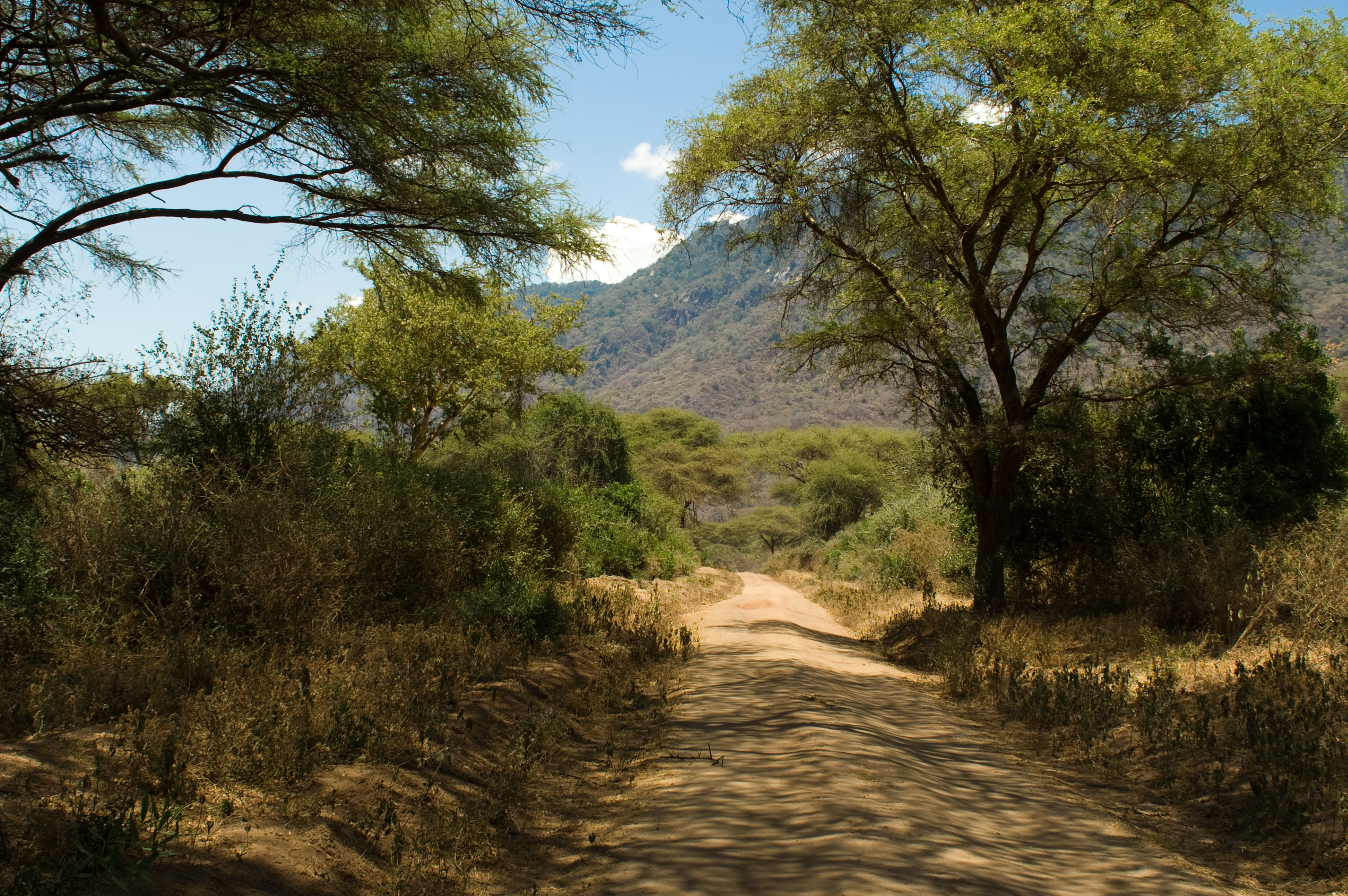 Lake Manyara national park, Tanzania.